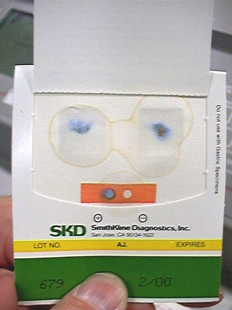 Guaiac_test.jpg